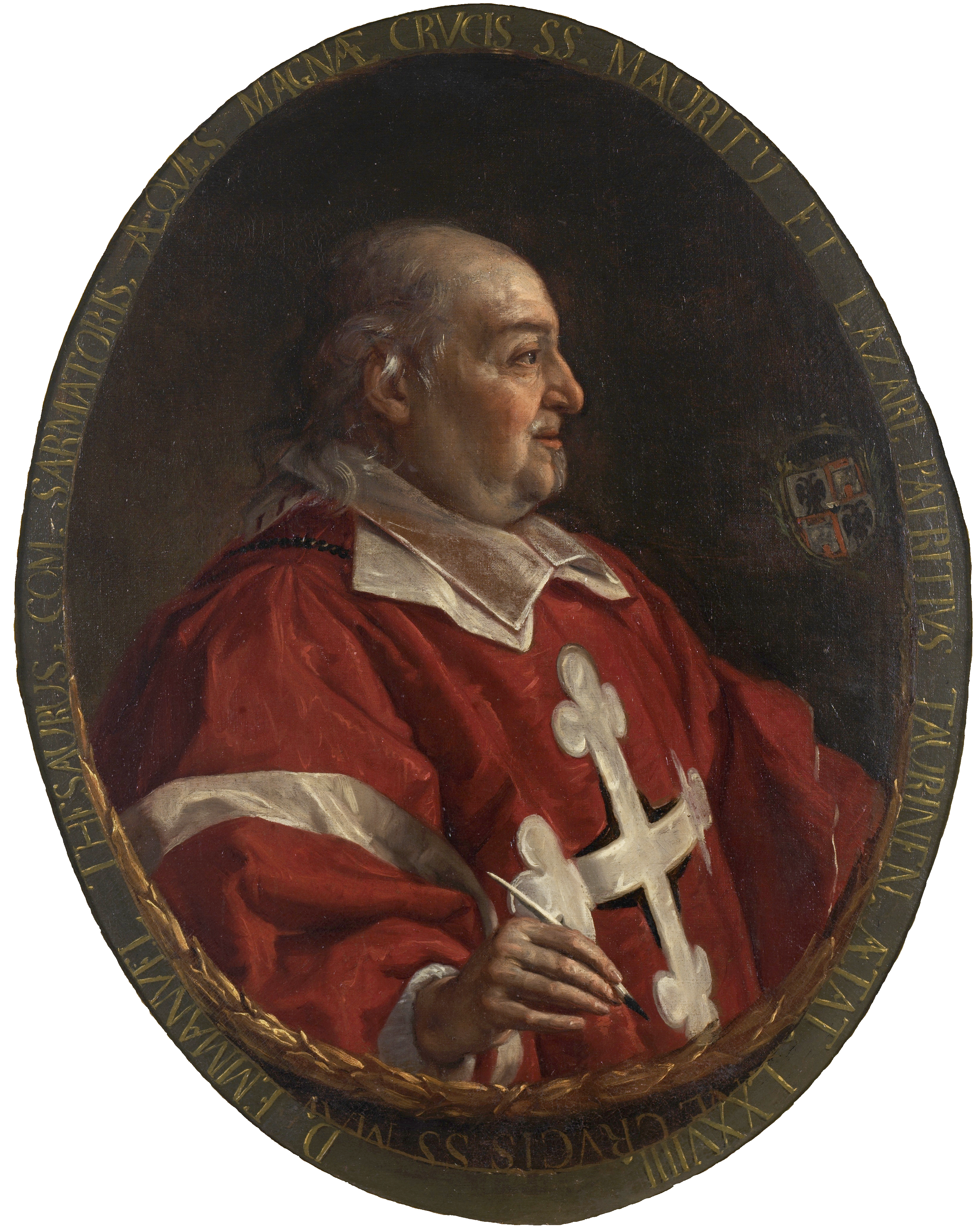 Ritratto di Emanuele Tesauro